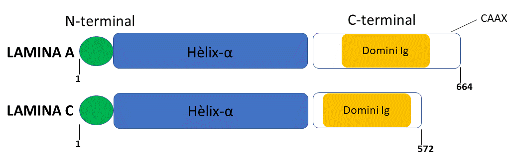 Esquema bàsic de l'estructura de la Lamina A i la lamina C, on es distingeixen els dominis de les proteïnes i el nombre d'aminoàcids.